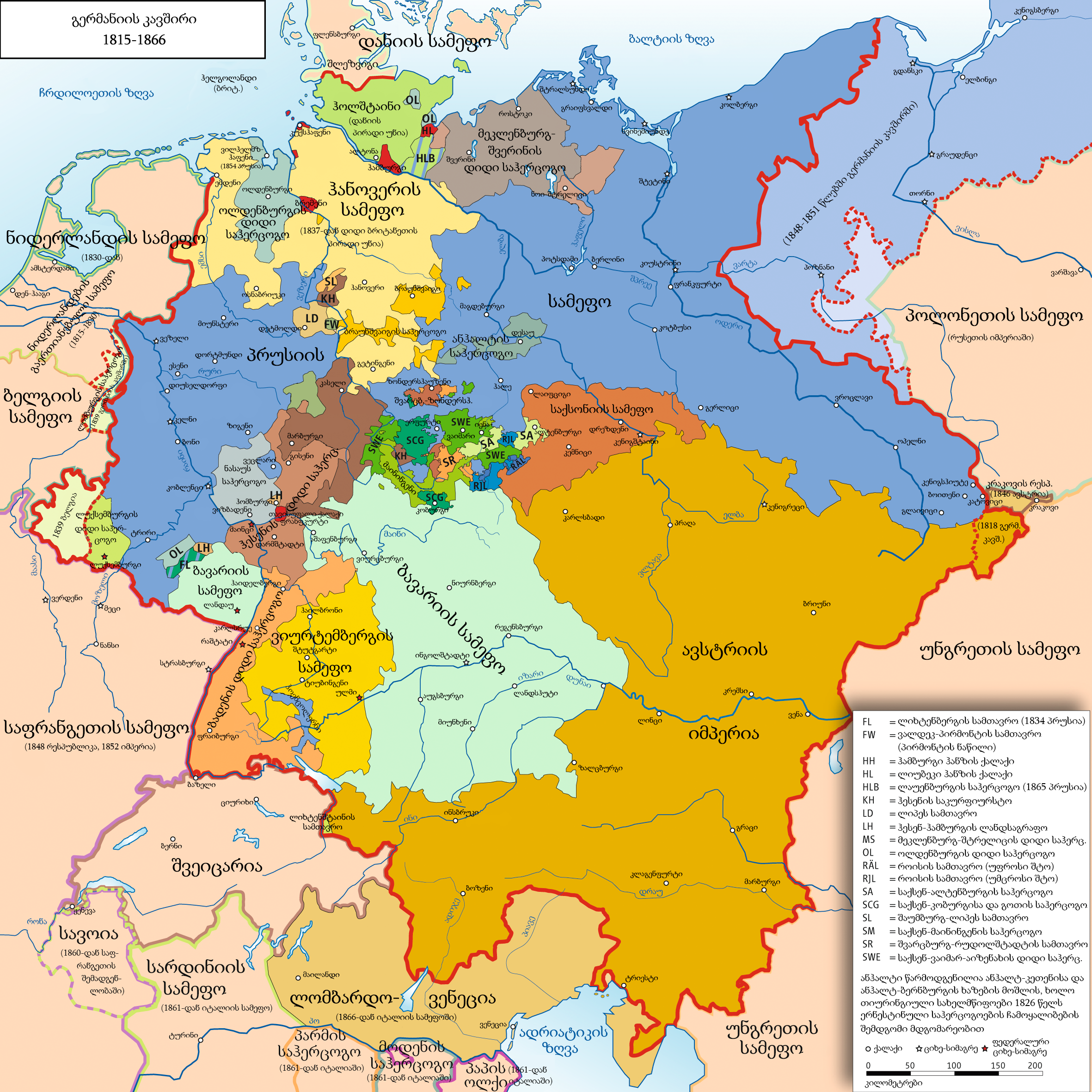 Karte des Deutschen Bundes 1815–1866 / Map of German Confederation 1815–1866